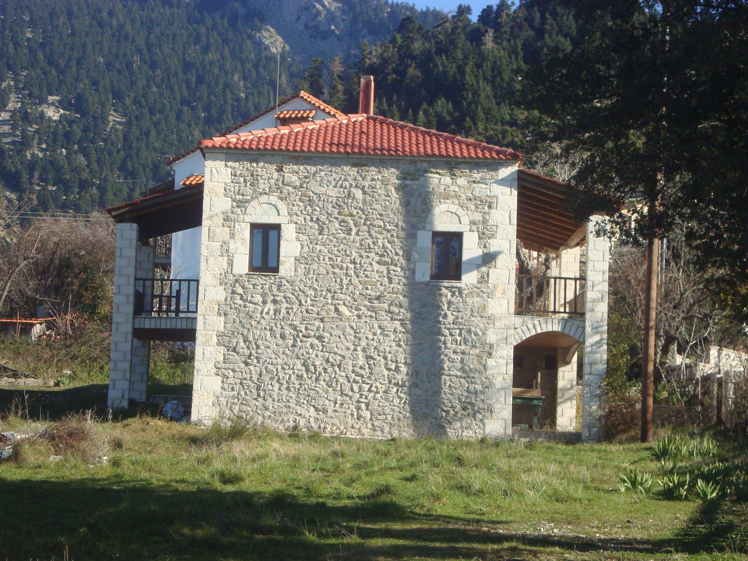 Η οικία της οικογένειας Μπελογιάννη στα Τσίπιανα Ηλείας